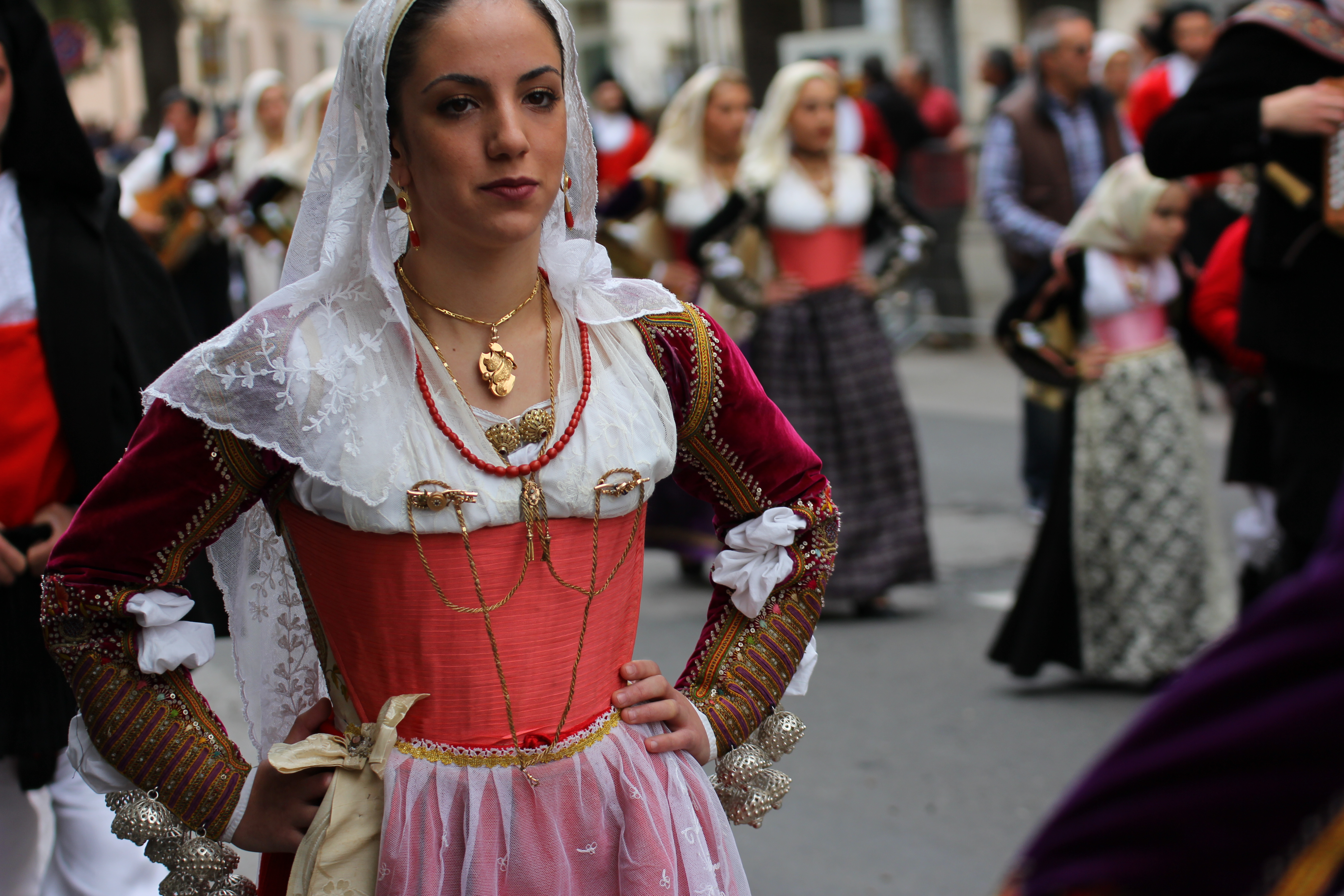 Costume tradizionale